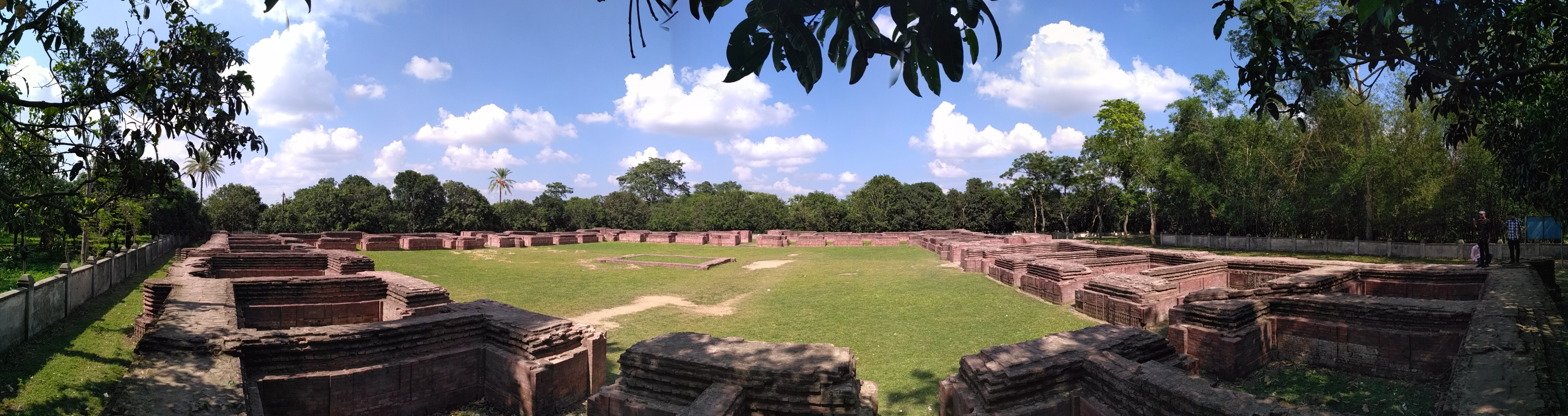 দারাস বাড়ী মসজিদ ও সংলগ্ন মাদ্রাসা ঢিবি